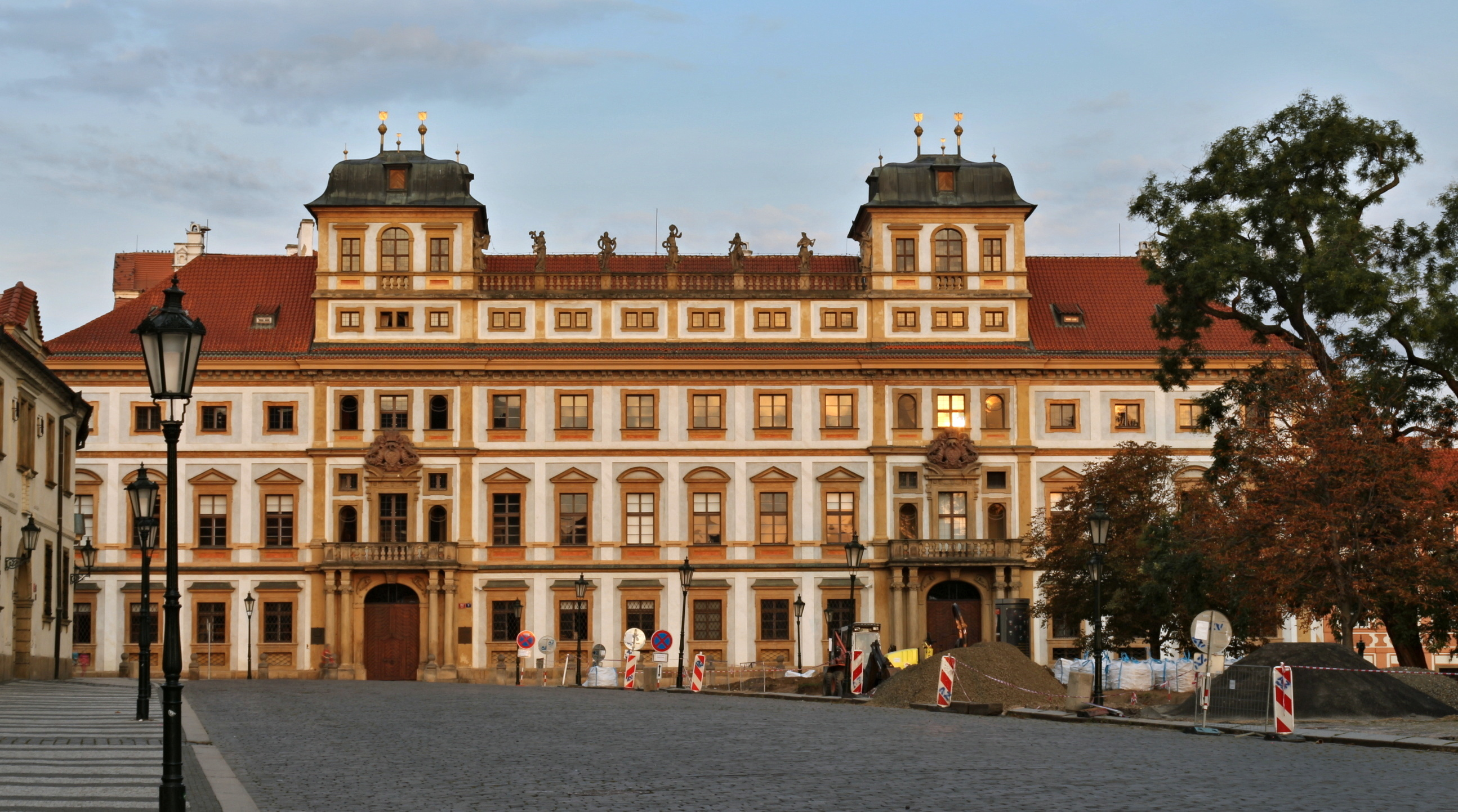 Toskánský palác v Praze na Hradčanech